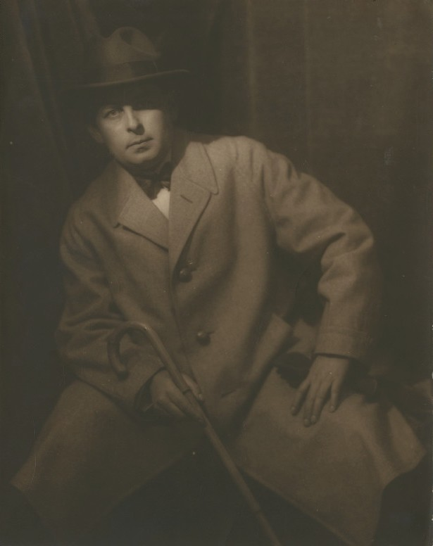 Jiří Jilovský, český malíř, grafik a scénograf